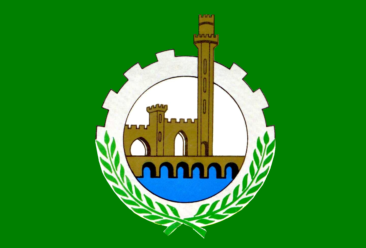 علم محافظة القليوبية، مصر